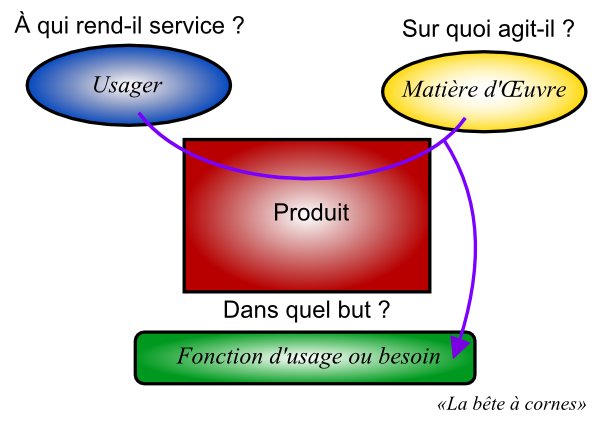 Outil d'aide à la définition et l'expression du besoin visé. Méthode APTE. Les champs en italique sont normalement vides et remplacés par les items adéquats.